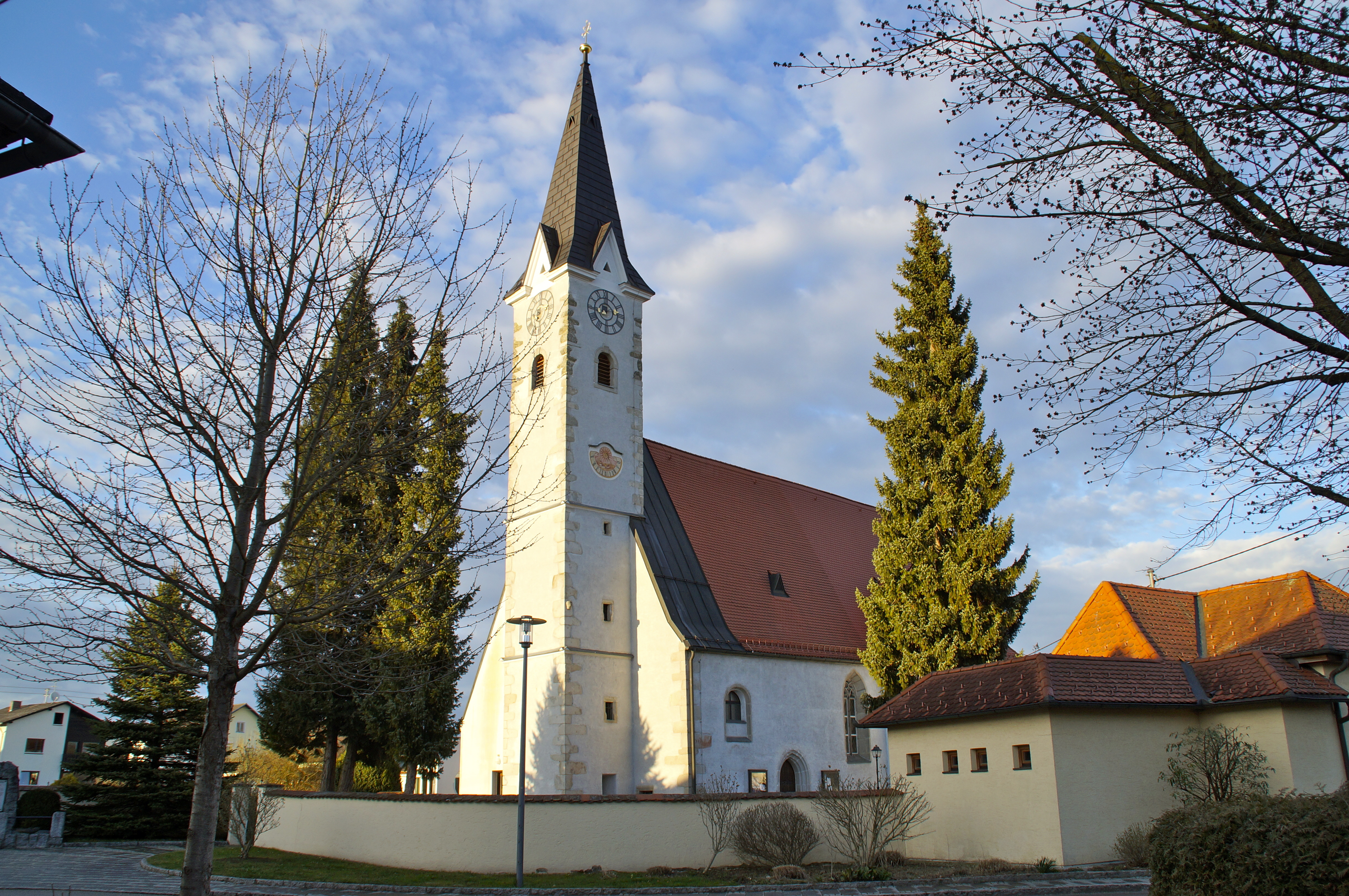 Kath. Pfarrkirche hl. Alban Goldwörth